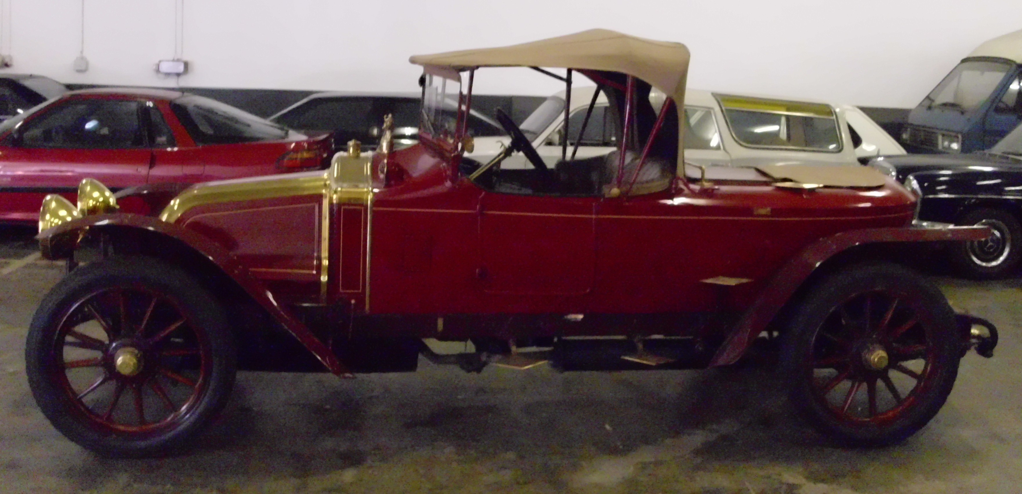 Renault Type EI Torpedo von Labourdette 1914